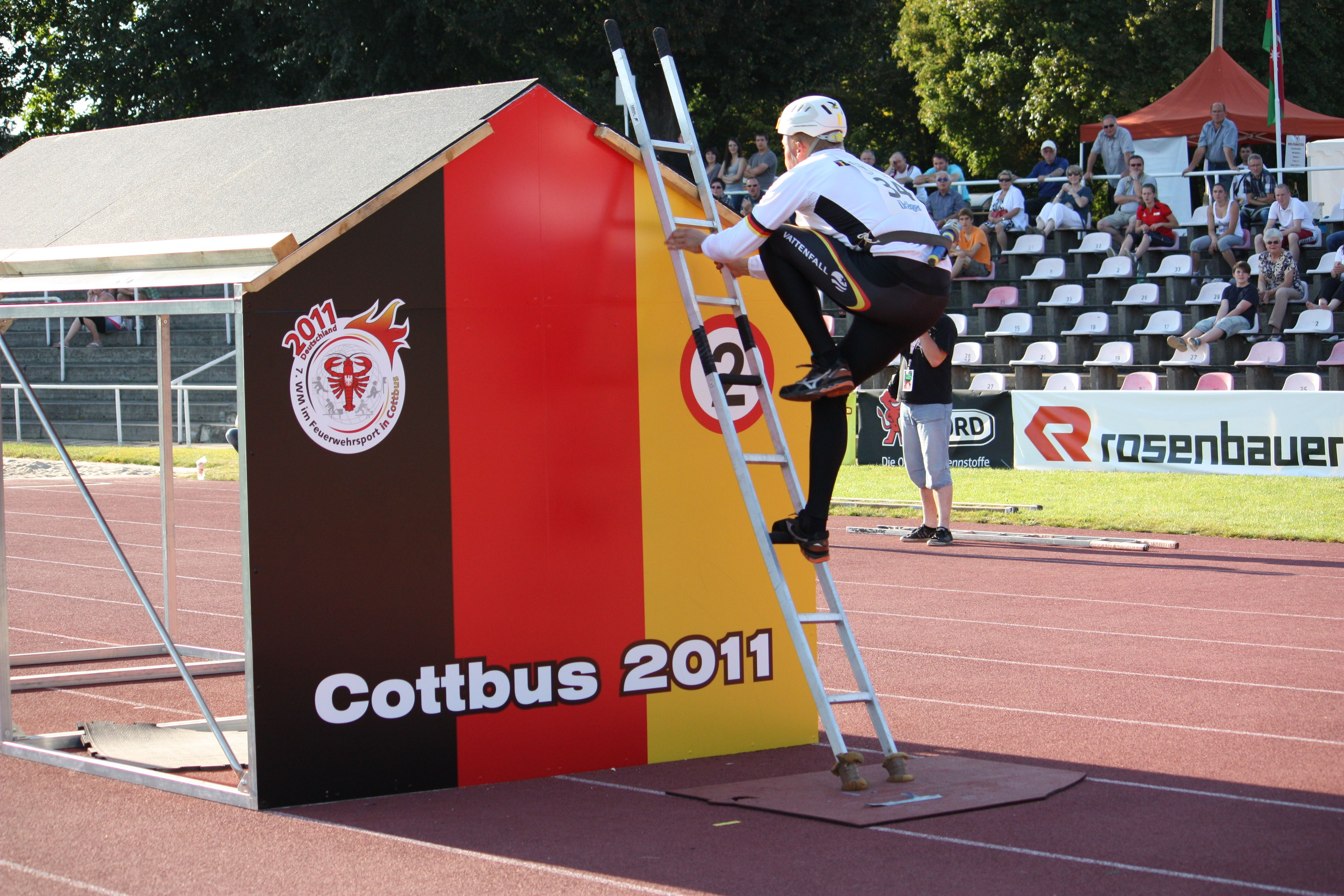 Überqueren des Hauses bei der 4x100-Meter-Feuerwehrstafette bei der 7. WM im Feuerwehrsport in Cottbus